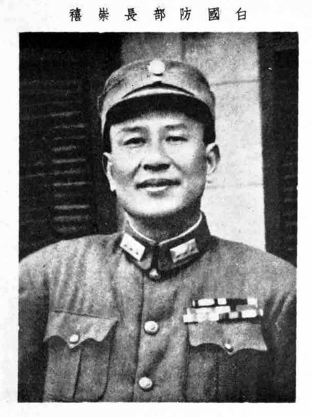 中文（台灣）: 上海市公訓同學紀念